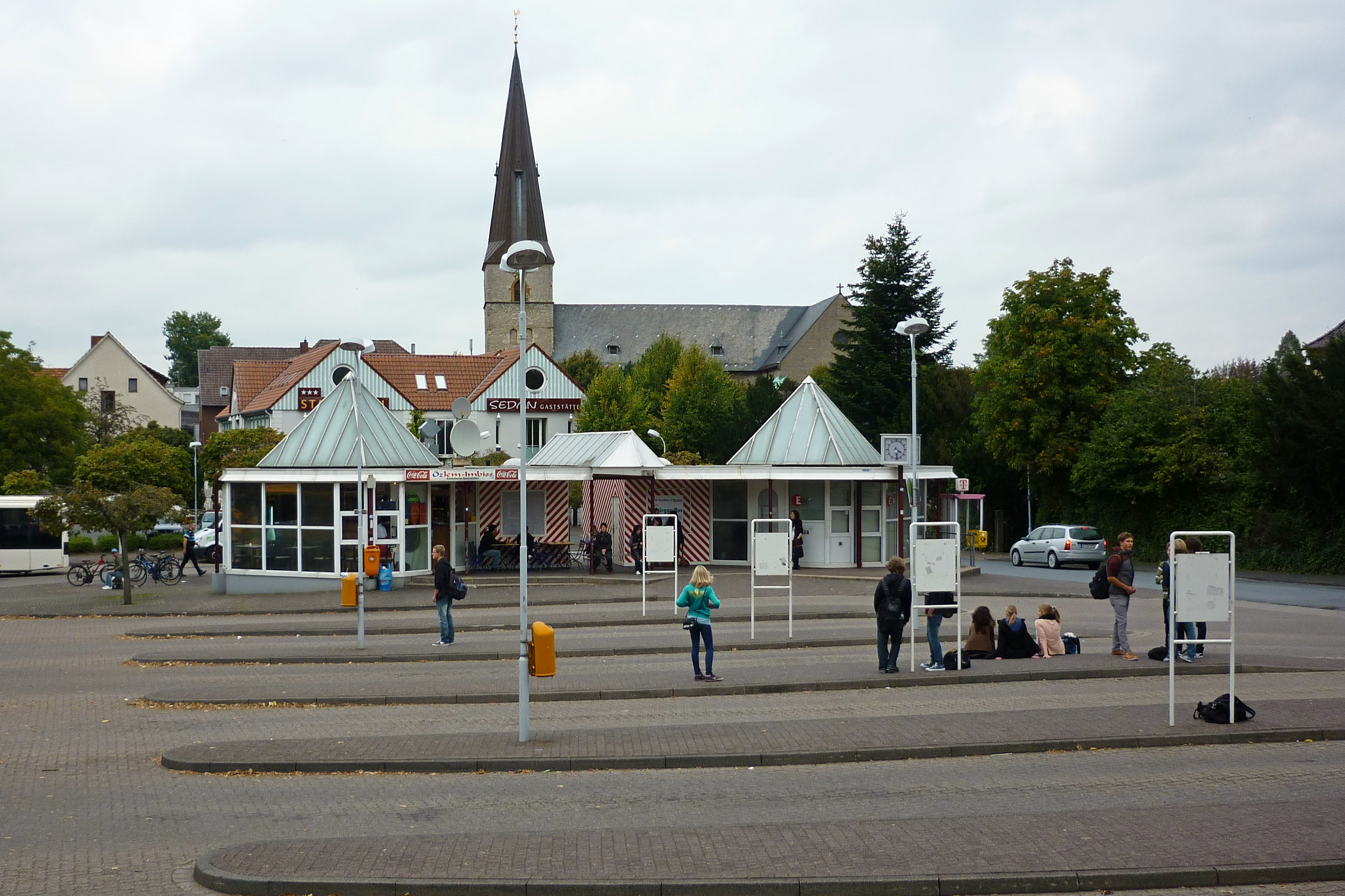 Werther (Westfalen), Busbahnhof.